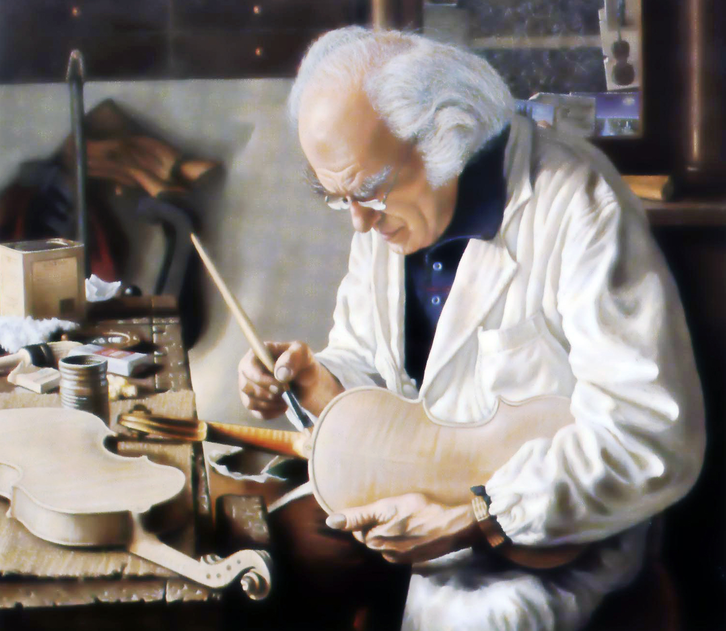 Otello Bignami painted portrait by Gioacchino Passini 1983